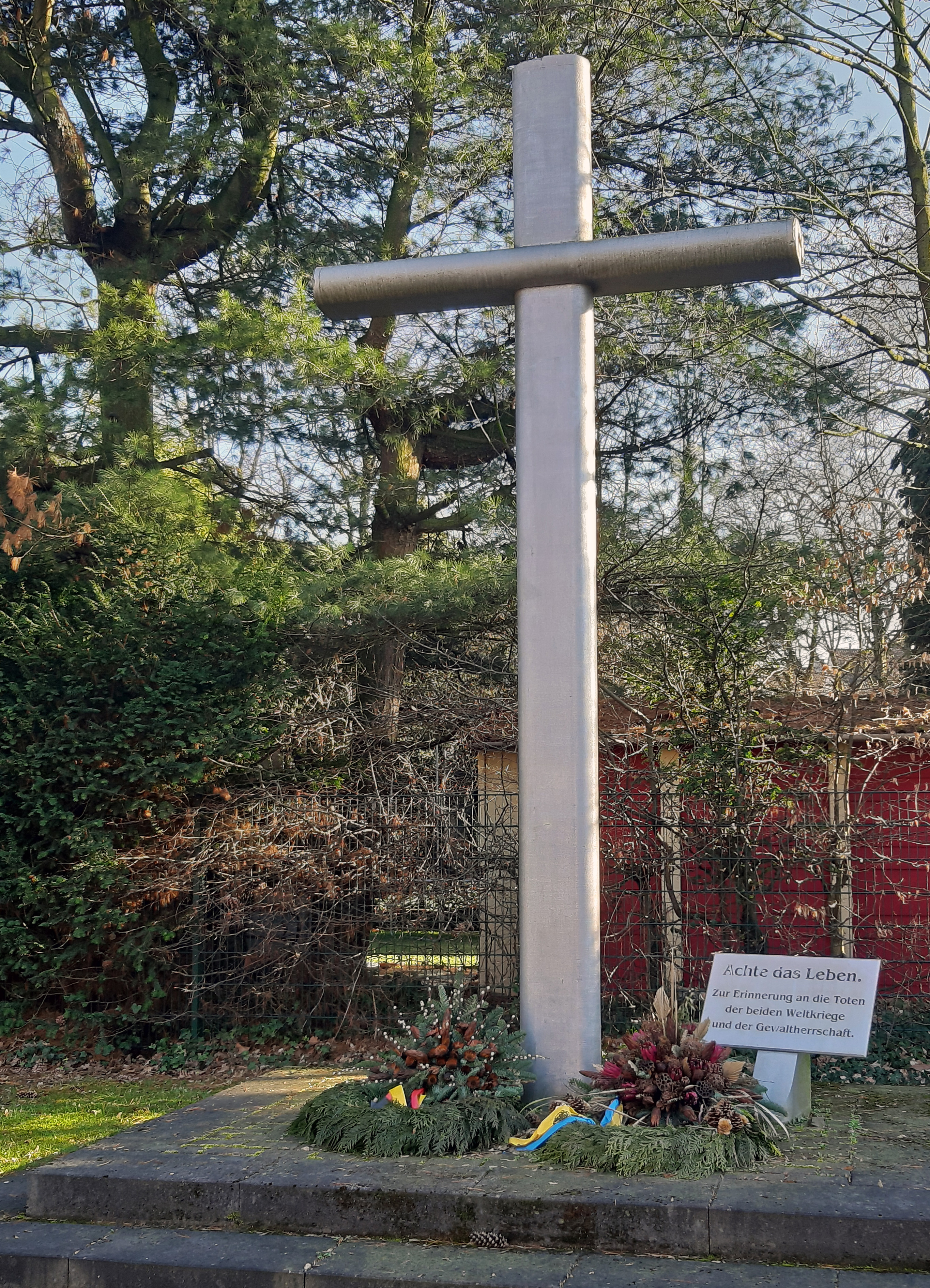 Mahnkreuz zum Gedenken an die Gefallen beider Weltkriege in Essen-Frintrop